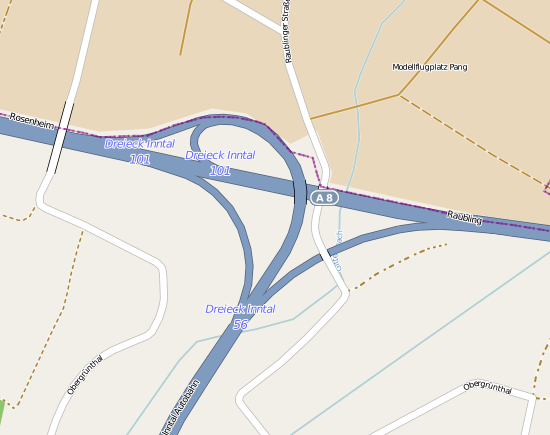 Das Autobahndreieck Inntal in Bayern.